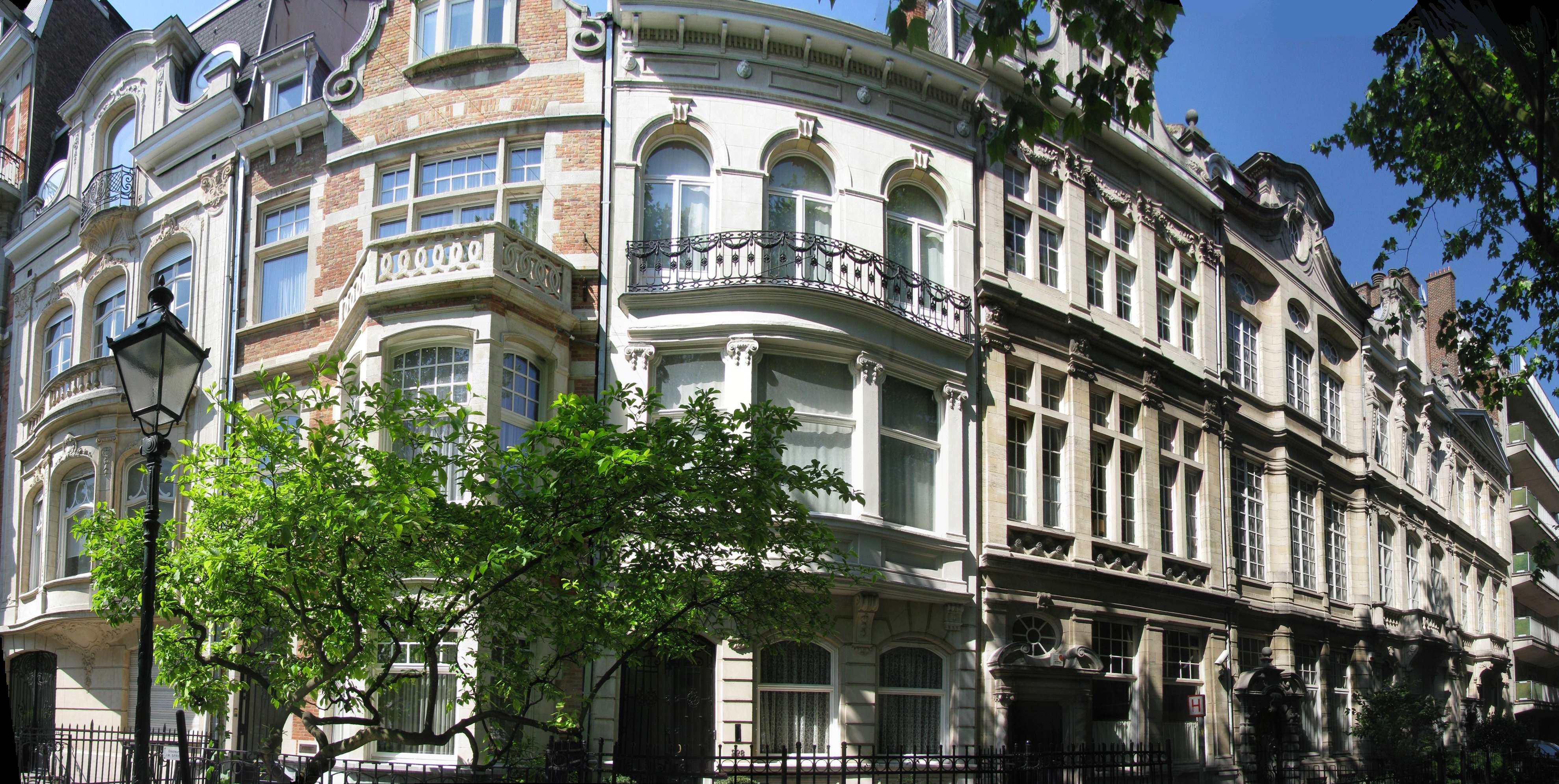 Ixelles, Hôtels de Maître avenue Molière, 230 à 236 par Camille Damman en 1912